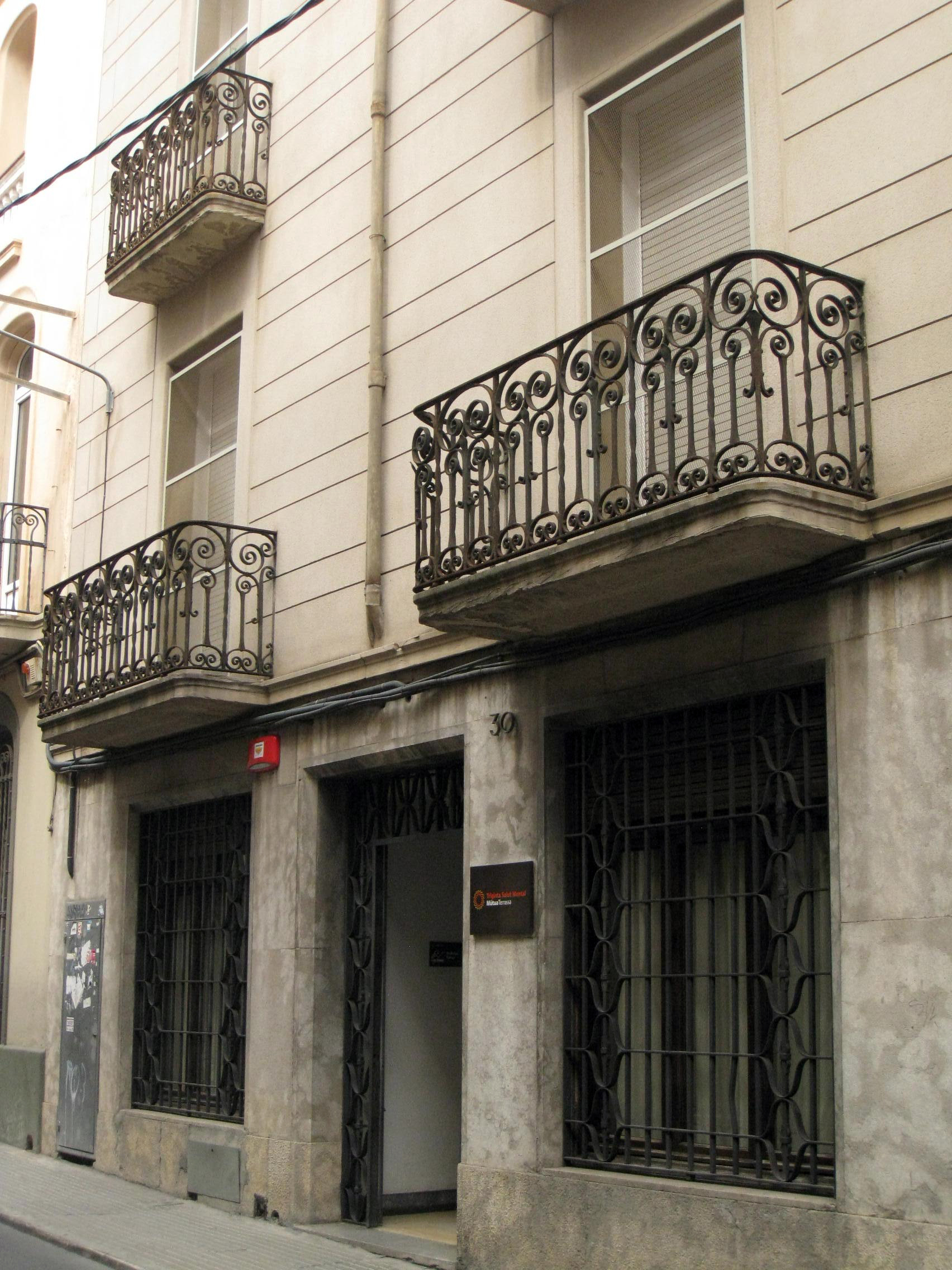 Casa Joan Salvans, al carrer de Sant Antoni núm. 30 (Terrassa). Edifici noucentista de Lluís Muncunill, del 1915.